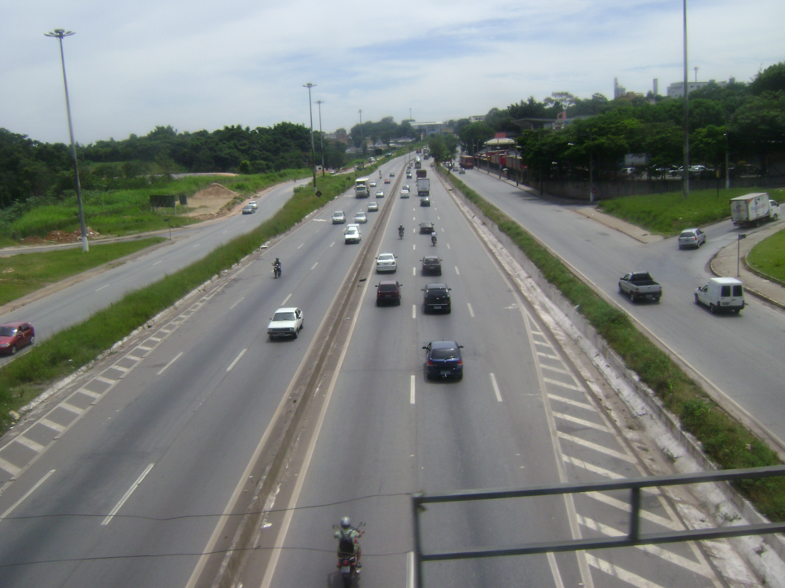 Vista do Anel Rodoviário através de viaduto da Avenida Carlos Luz (Catalão), em Belo Horizonte, Brasil.